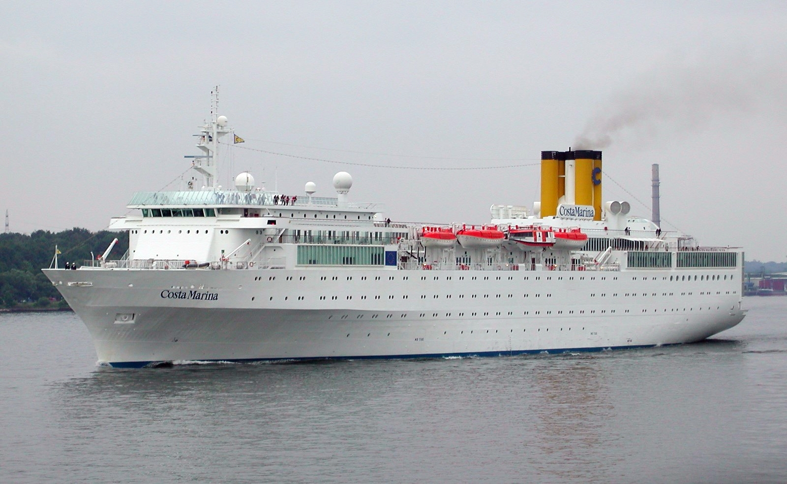 Kreuzfahrtschiff Costa Marina in der Kieler Förde.